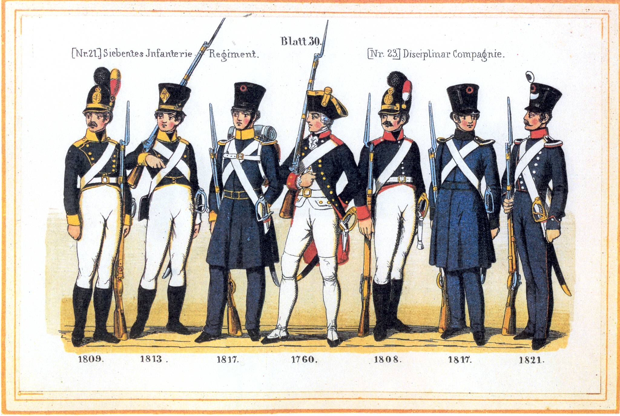 Blatt 30: 7. Infanterie-Regiment, Disziplinar-Compagnie